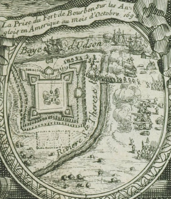 Plan mettant en scène la prise de fort Bourbon en 1694 par les forces de d'Iberville. Guerre de la ligue d'Augsbourg.